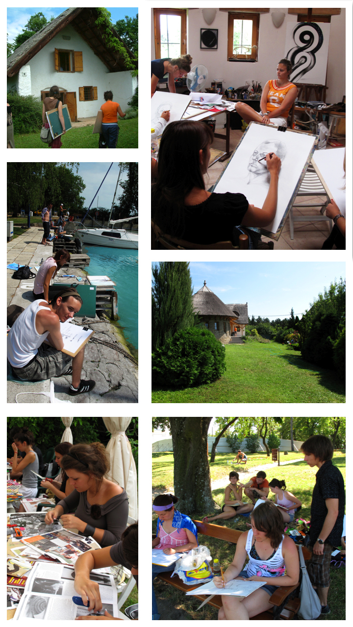 Alkotómunka Csopakon